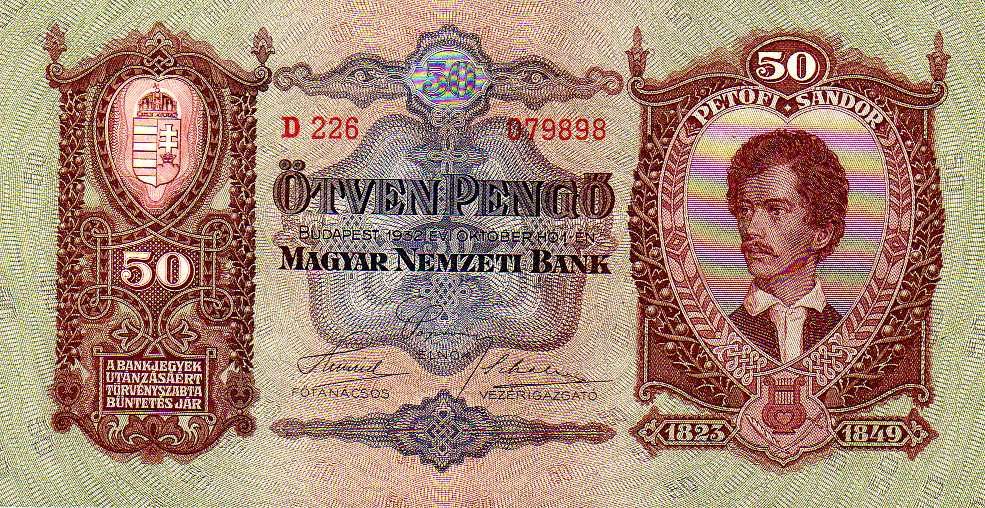 50 Hungarian pengő (1932) - obverse